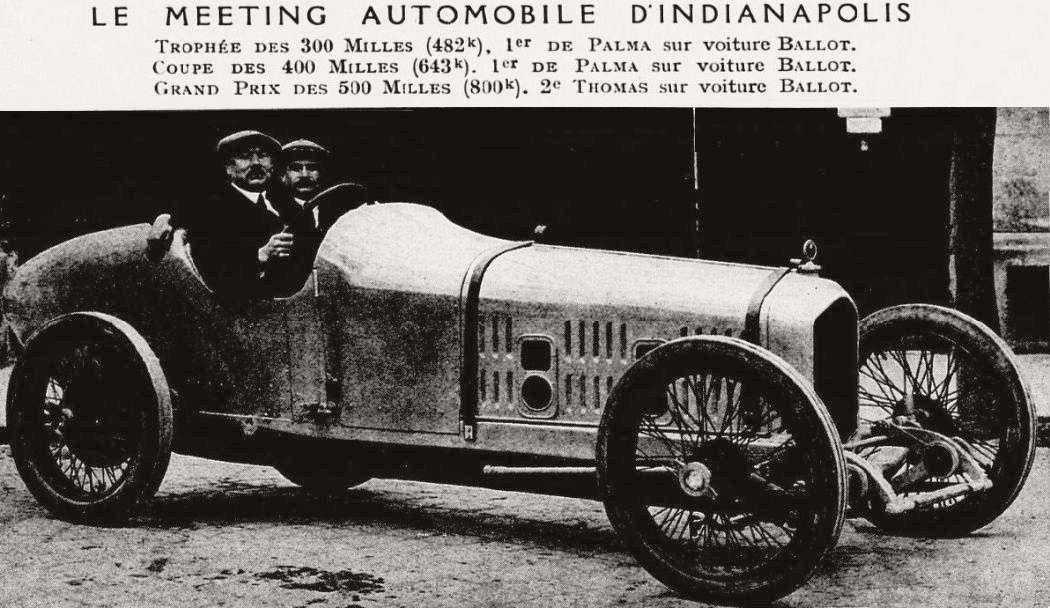 René Thomas sur Ballot à Indianapolis en 1920 - Le Monde illustré du 5 juin 1920, p.338